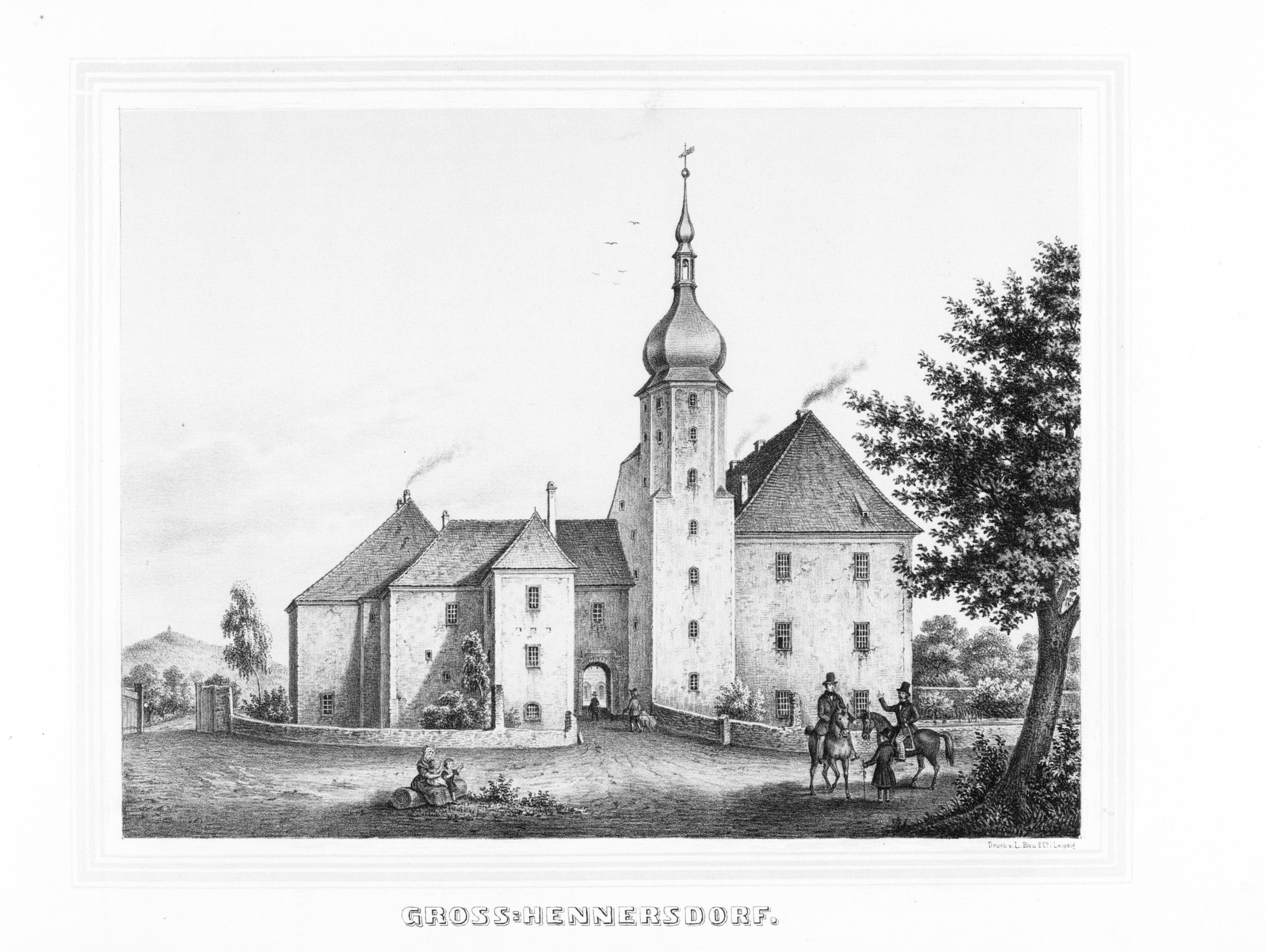 Gross - Hennersdorf aus: Album der Rittergüter und Schlösser im Königreiche Sachsen Markgrafenthum Oberlausitz Section: III